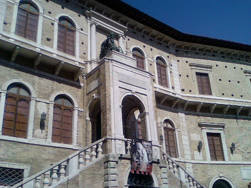 Palazzo dei Priori Fermo